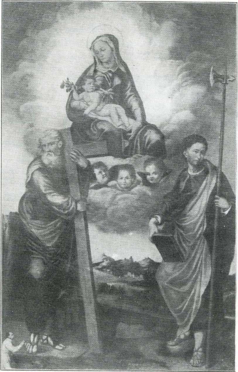 S. Simone e Giuda Messina Chiesa Oratorio della Pace